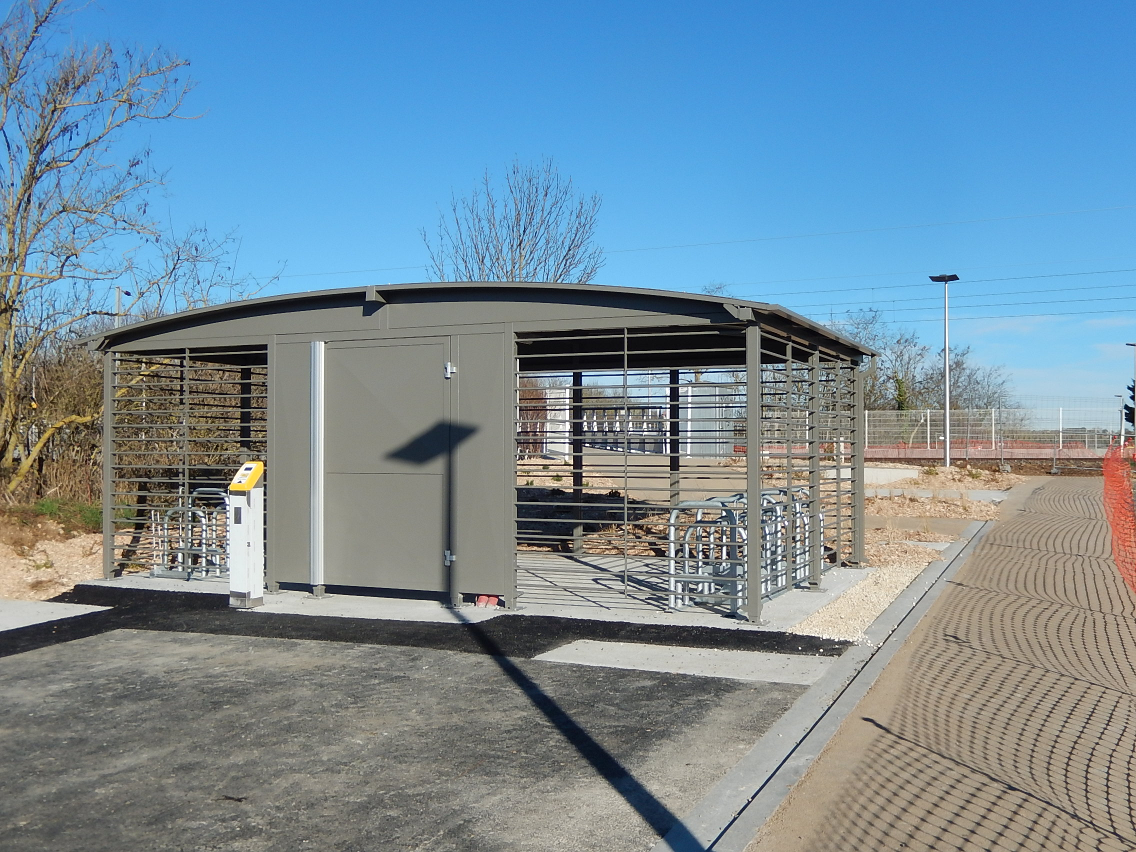 Le garage à vélos de la halte ferroviaire de La Jarrie, en Charente-Maritime. Il fait partie du réseau Yélo, le réseau de transports en commun de l'agglomération rochelaise.